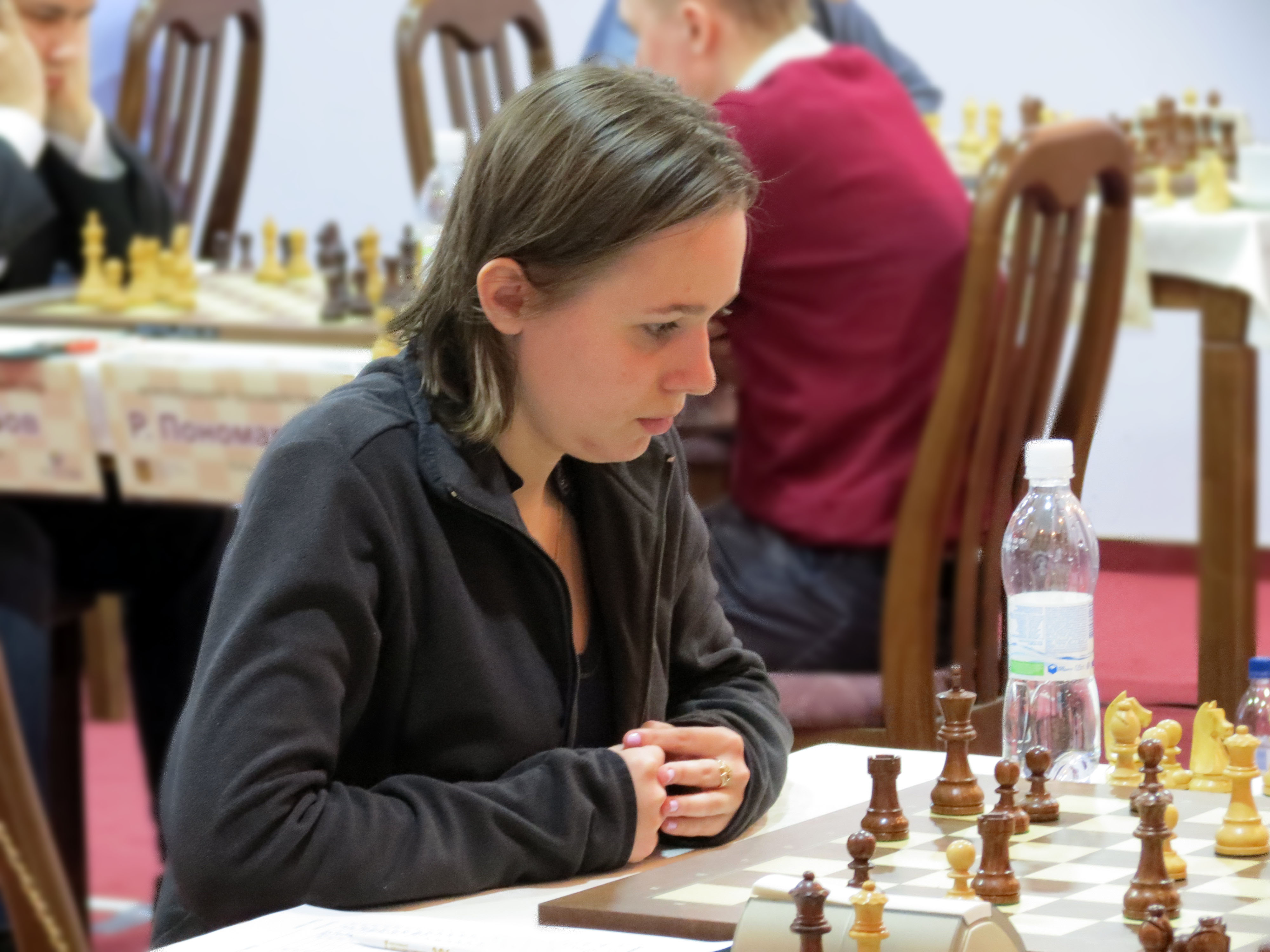 Mariya Muzychuk. Lviv. Ukraine championship 2014